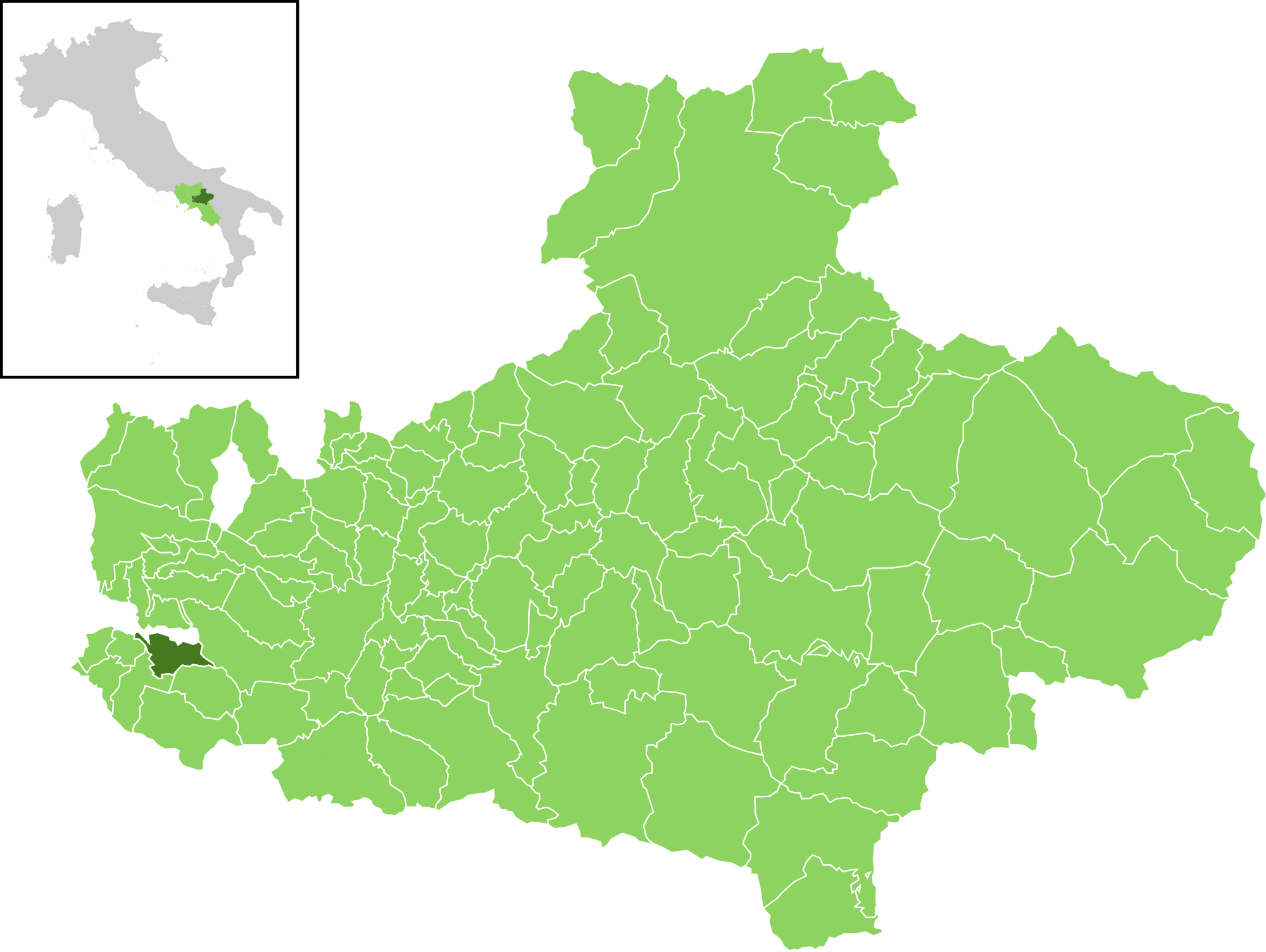 Posizione del comune all'interno della provincia di Avellino